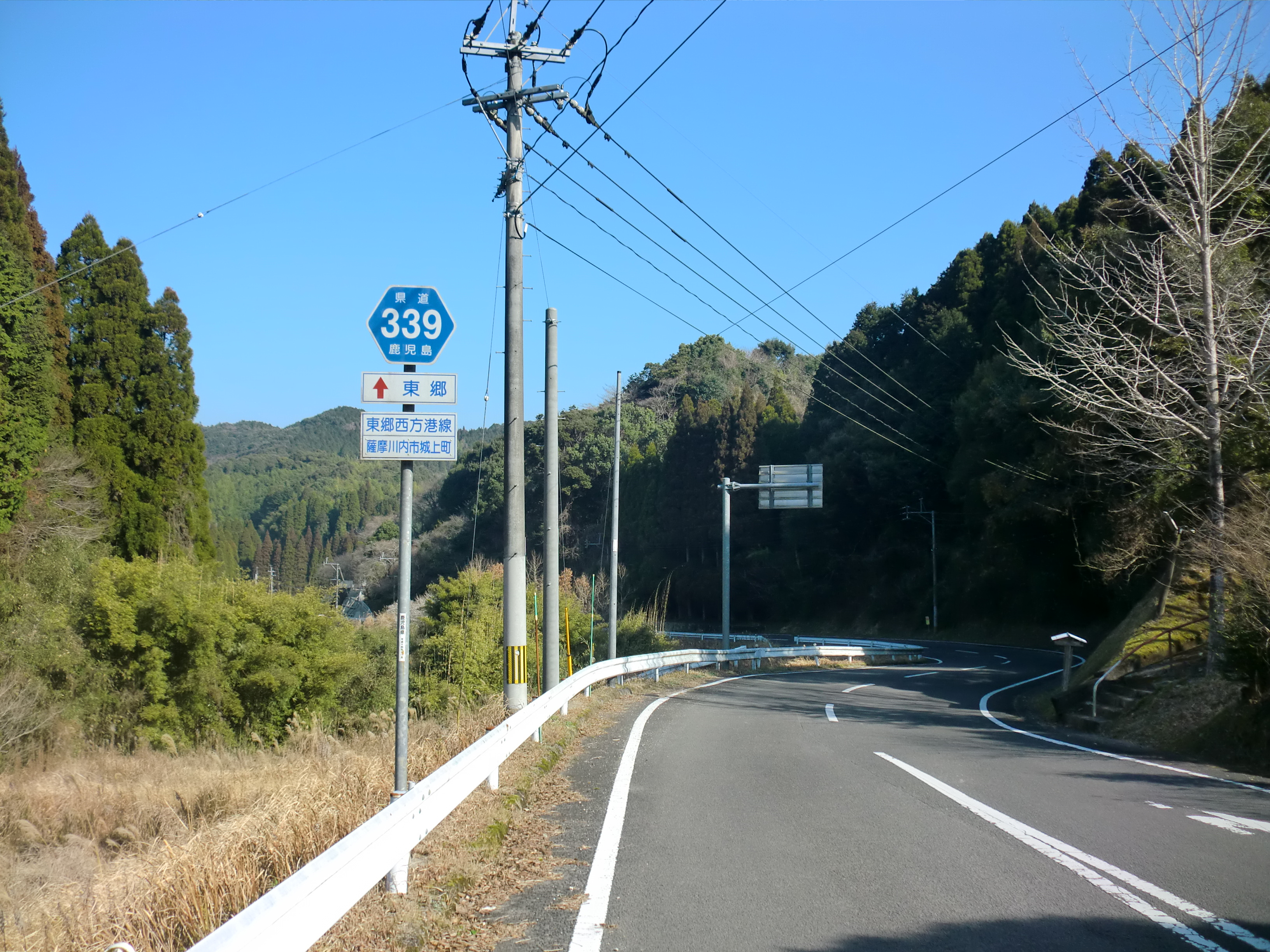 鹿児島県道341号東郷西方港線。薩摩川内市で撮影。